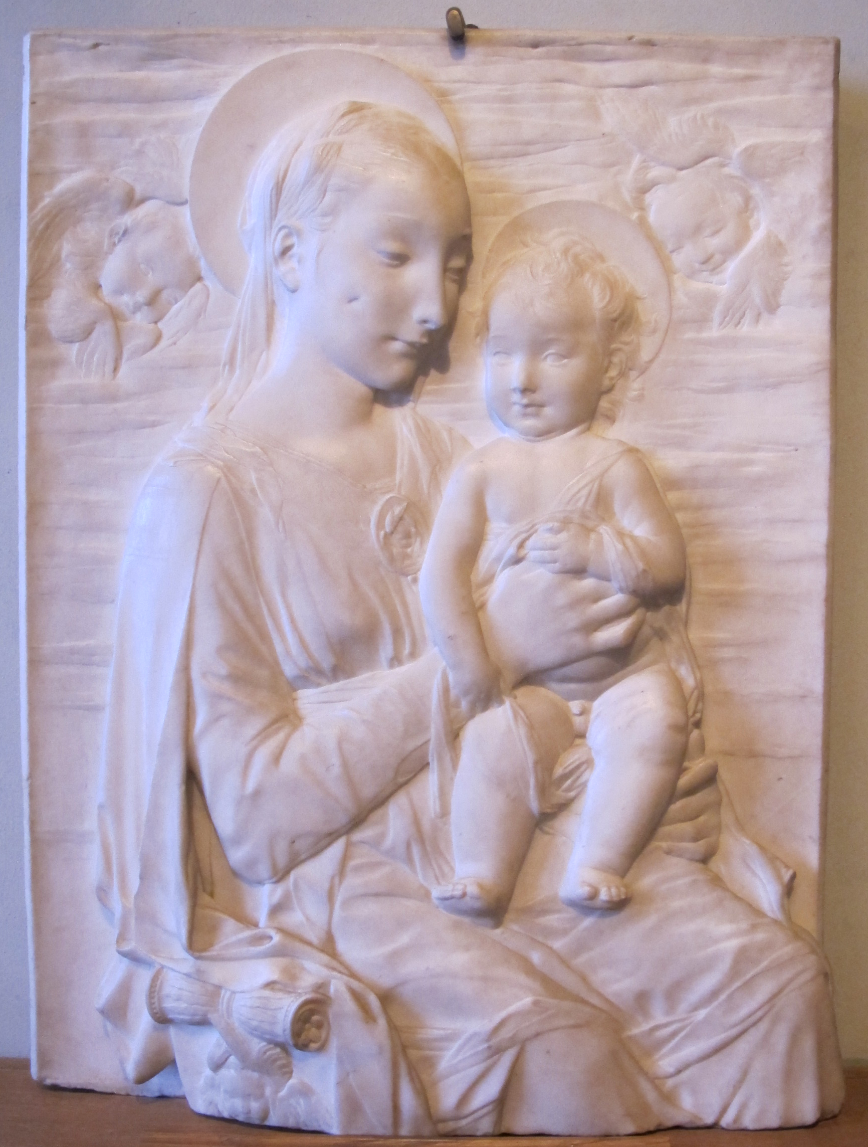 Antonio rossellino, madonna col bambino